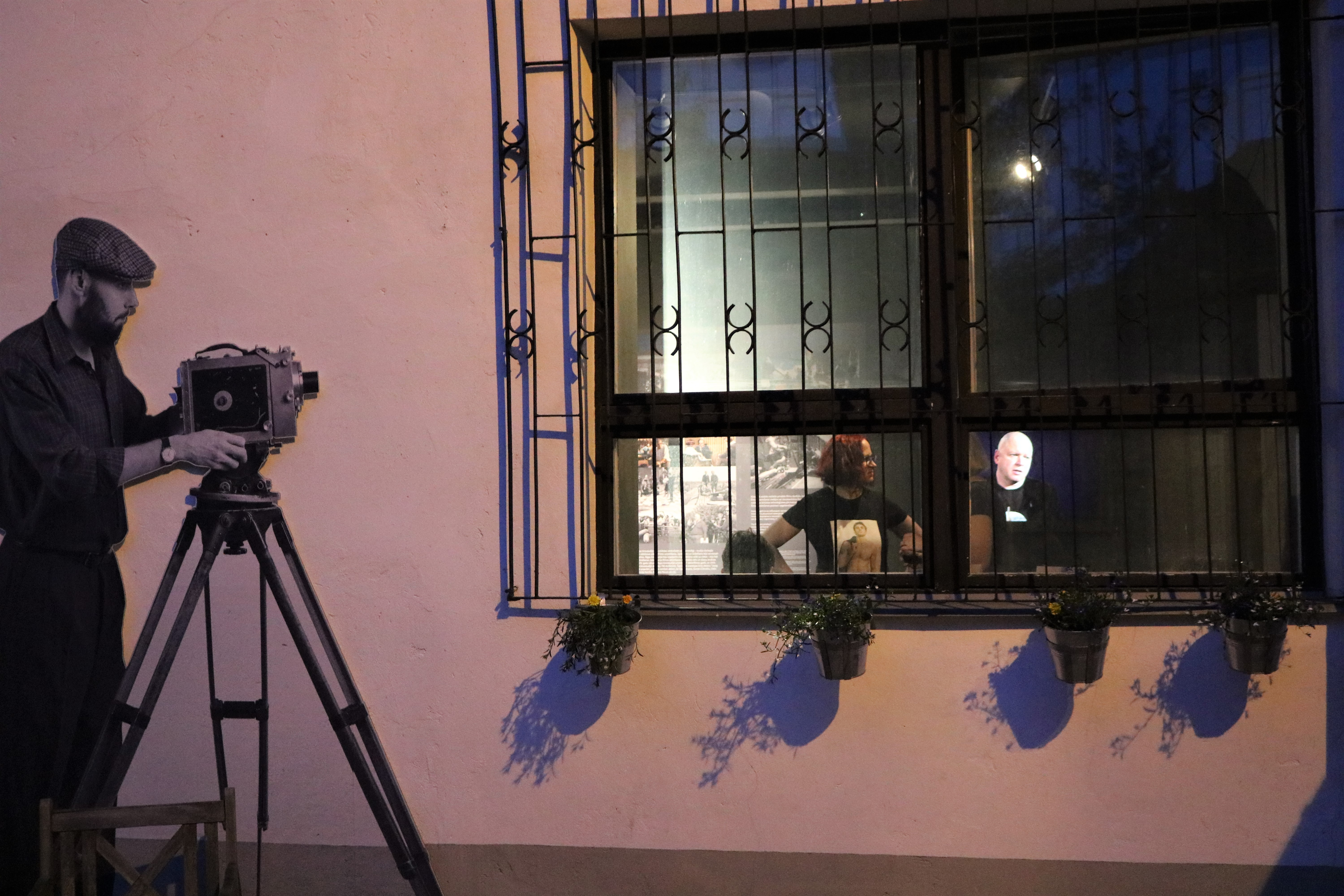 Kinomuzejs vakarā